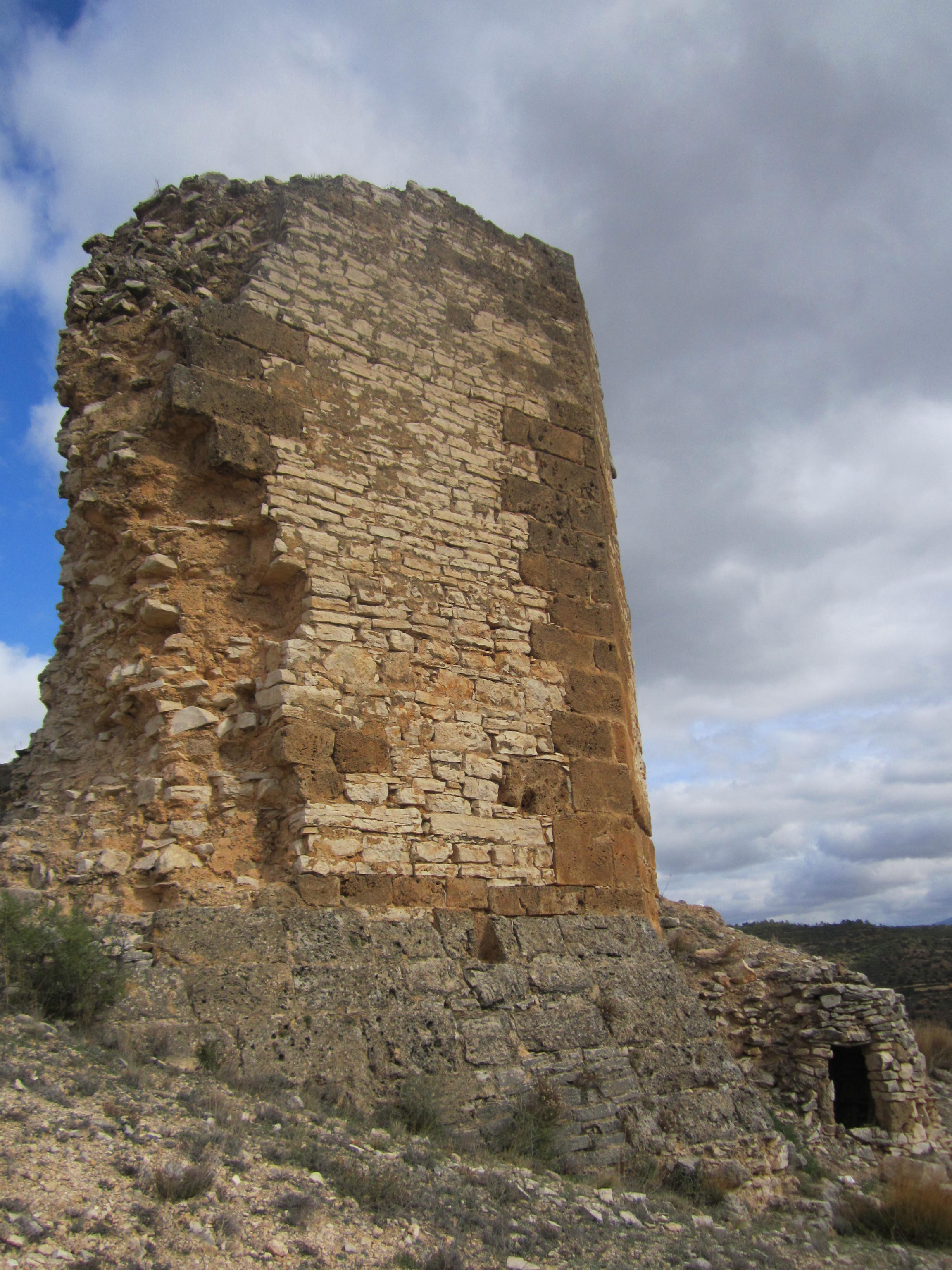 Ruinas de la Torre Albarrana